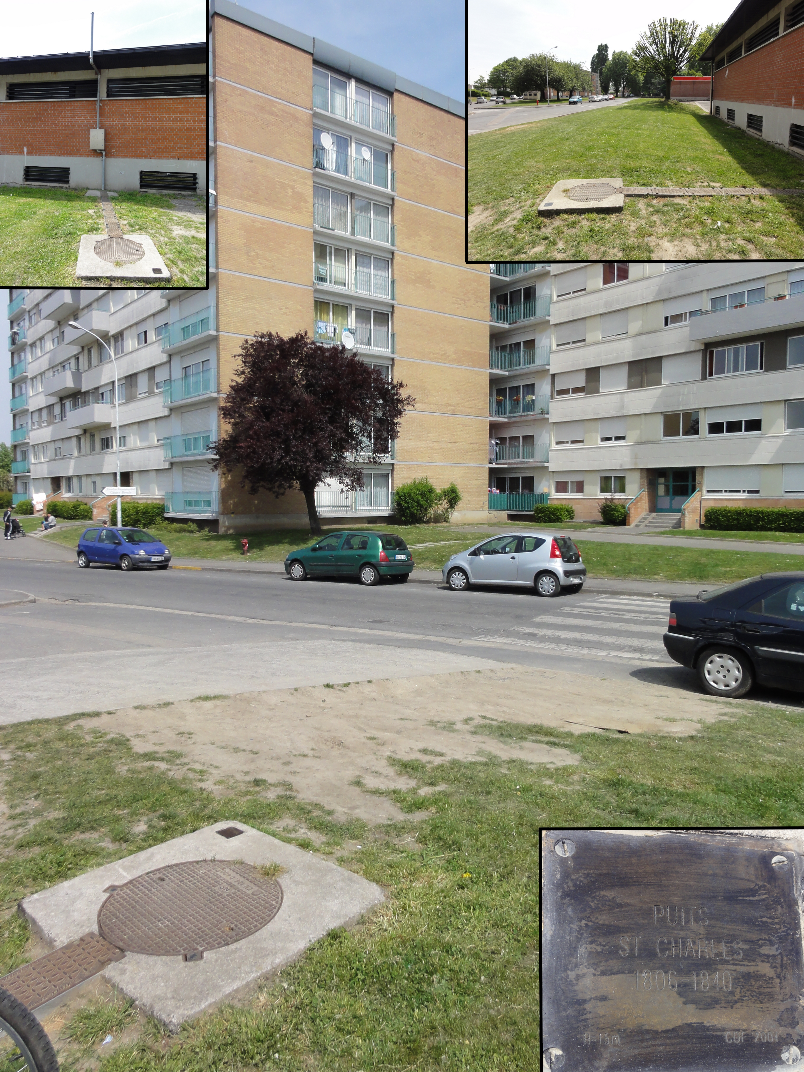 La Fosse Saint Charles de la Compagnie des mines d'Anzin était un charbonnage constitué d'un seul puits situé à Valenciennes, Nord, Nord-Pas-de-Calais, France.